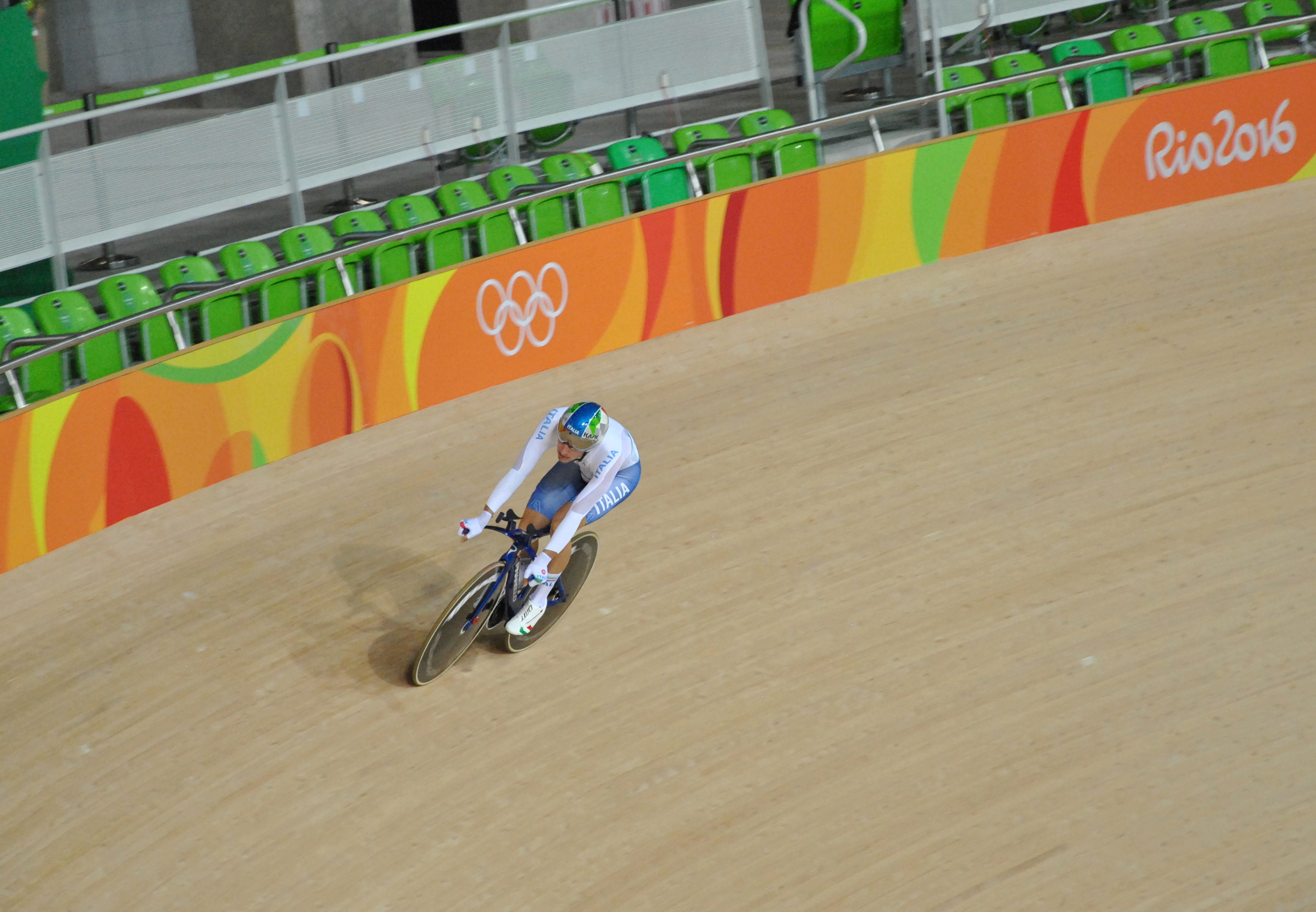 Ciclismo de pista. Men's Omnium. Rio Olympic Velodrome. Rio 2016. Elia Viviani.